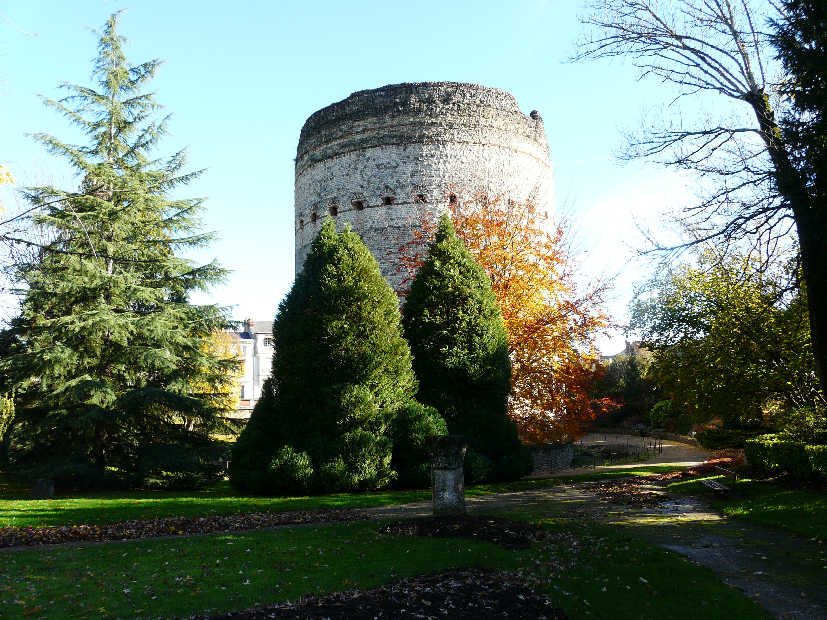 La tour de Vésone, Périgueux, Dordogne, France.